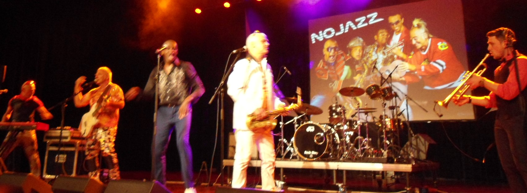 Die französische Gruppe NoJazz beim Jazzfestival St. Ingbert